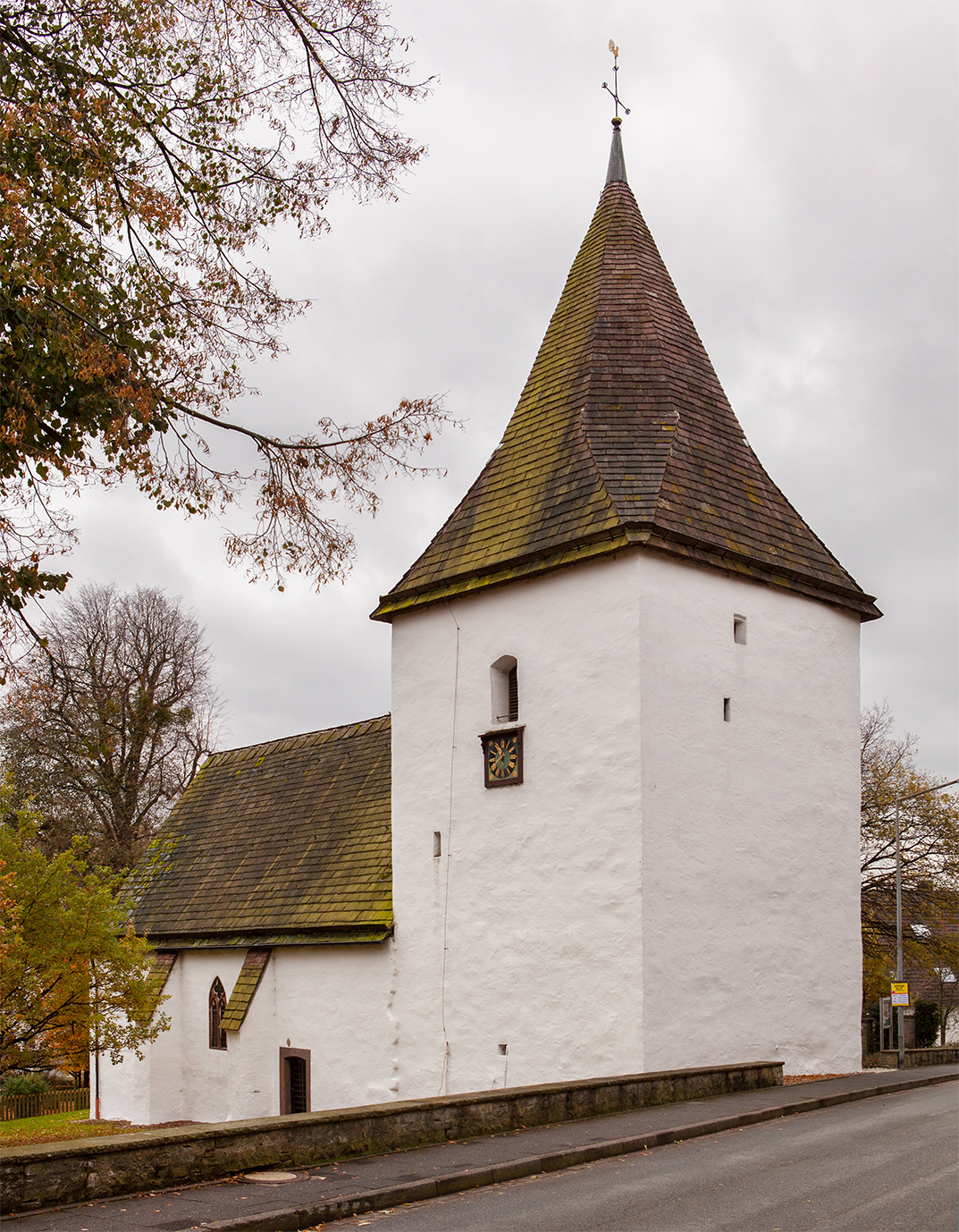 Evangelische Kirche Sonneborn (Barntrup) This is the photograph of an architectural monument. It is part of the list of cultural monuments of Barntrup, no. 5